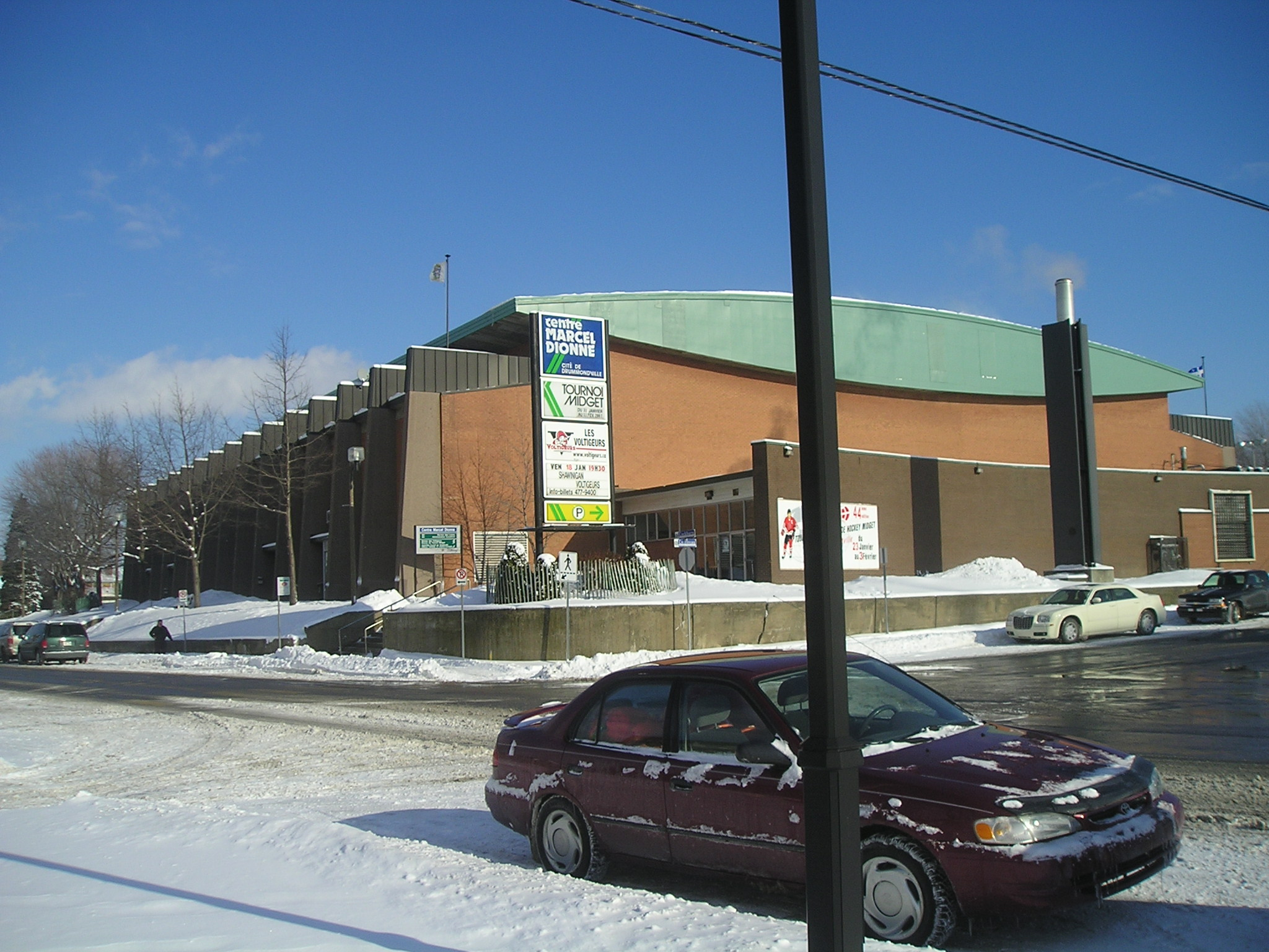 Centre Marcel Dionne